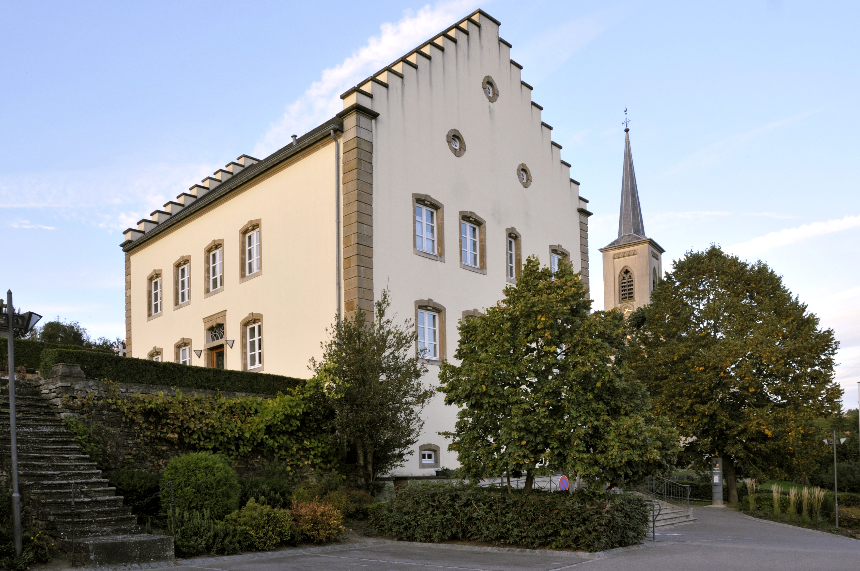 D'Märei vu Manternach.